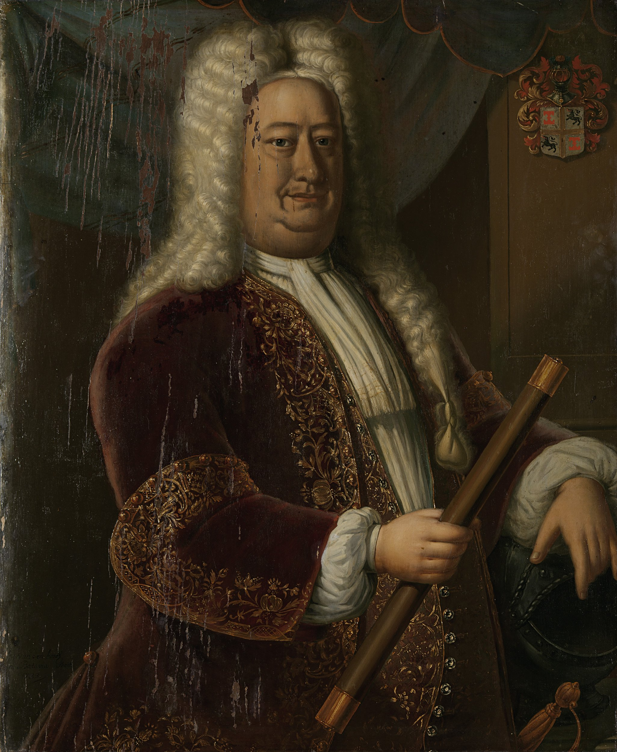 Portret van Dirk van Cloon (1684-1735). Gouverneur-generaal (1730-35). Staande, ten halven lijve naar rechts. Commandostaf in de rechterhand, met de linkerarm leunend op een helm op een tafel. Rechtsboven het familiewapen. Onderdeel van een reeks van portretten van de gouverneurs-generaal van het voormalige Nederlands Oost-Indië. Collection: schilderijen; Gouverneurs-generaal serie